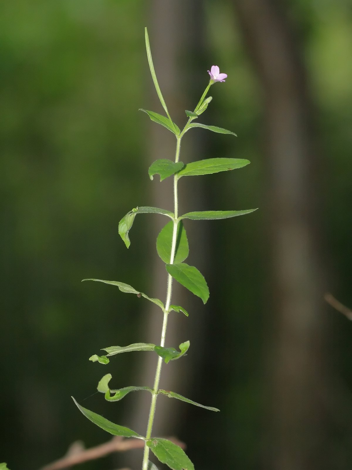 Kleinblütiges Weidenröschen (Epilobium parviflorum)